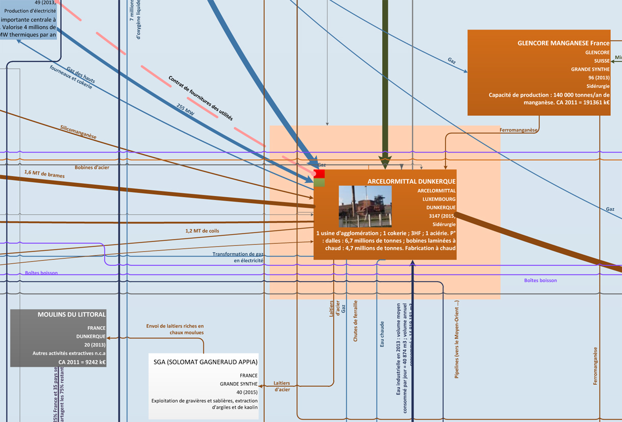 Zoom sur une entreprise de la toile industrielle de 2015